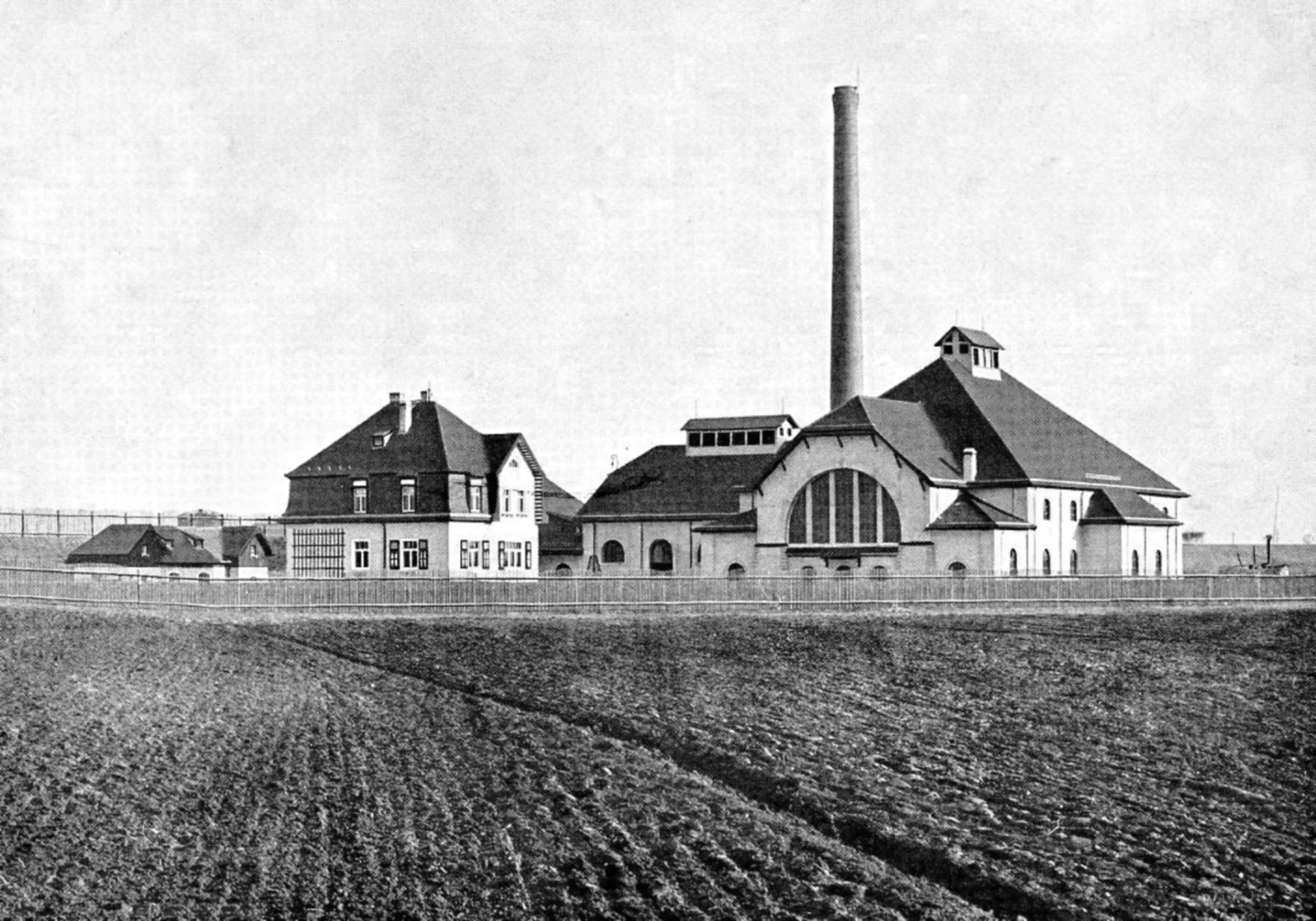 Das neu erbaute Wasserwerk Canitz, Fotografie von 1912